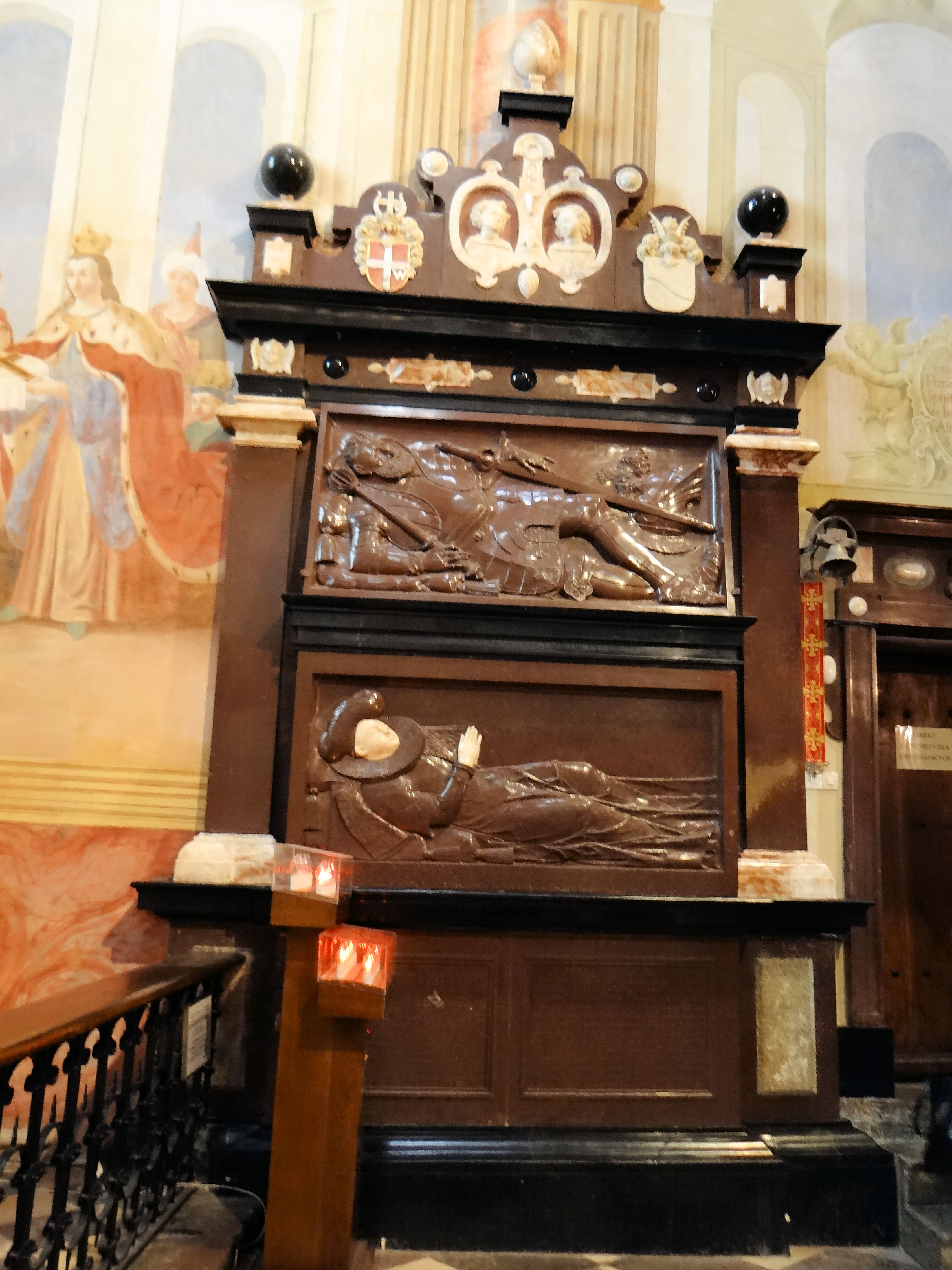 Kaplica Świętych Relikwii w Sanktuarium św Krzyża - nagrobek